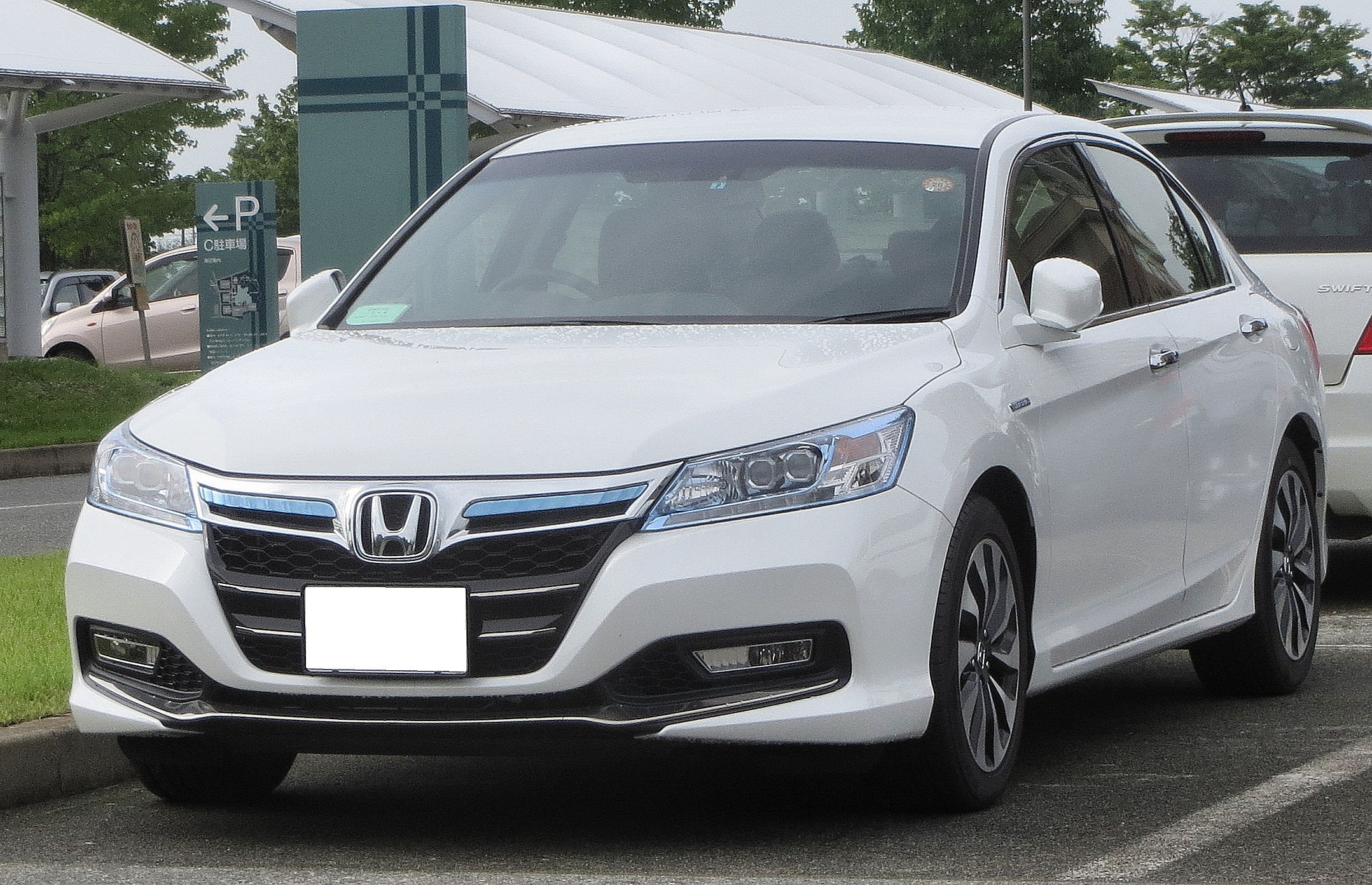 ホンダ・アコードハイブリッド